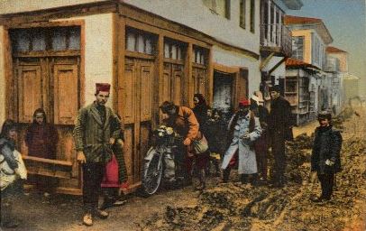 Улица в Дойран в началото на 20 век.